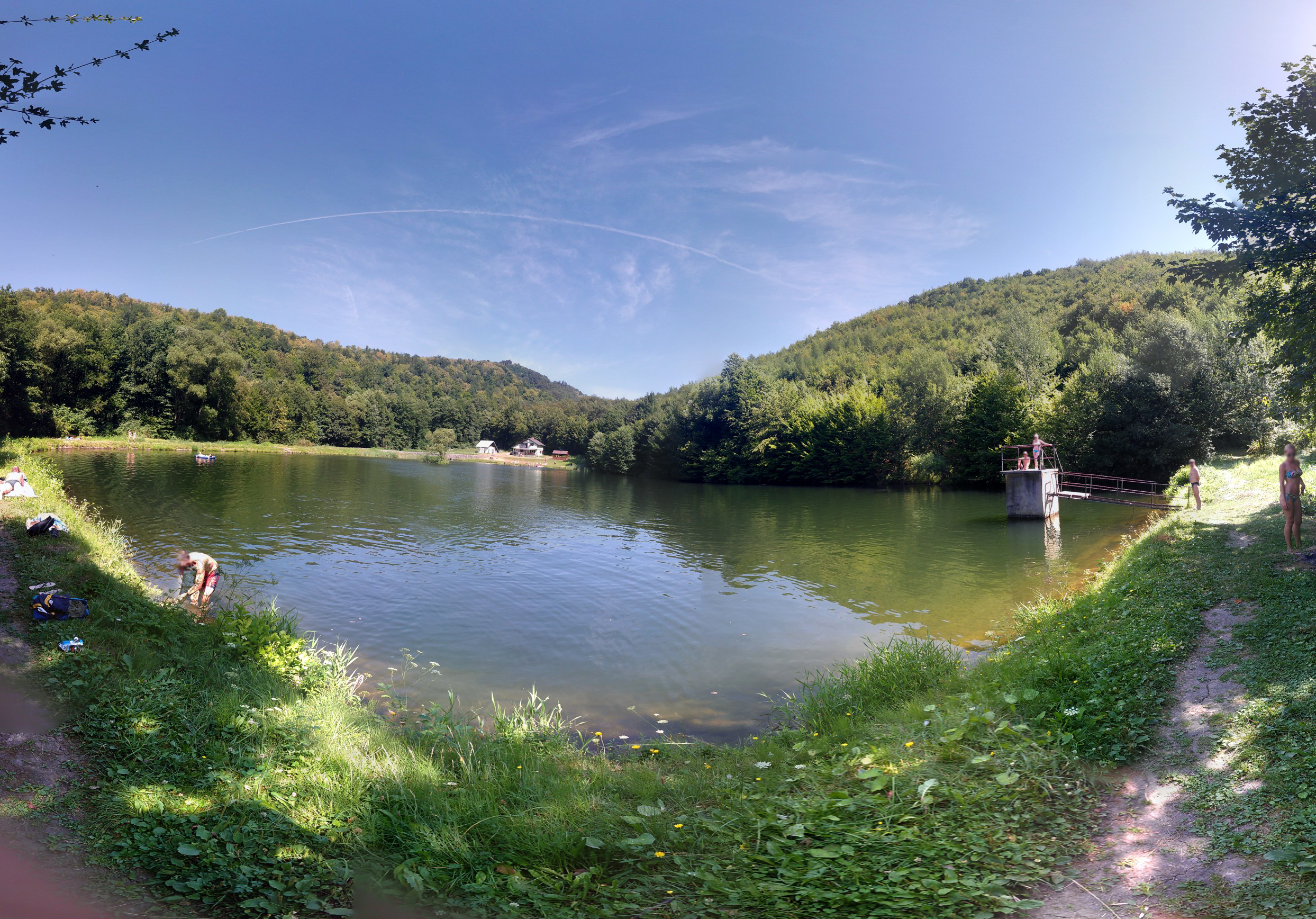 Ihracsky Rybnik